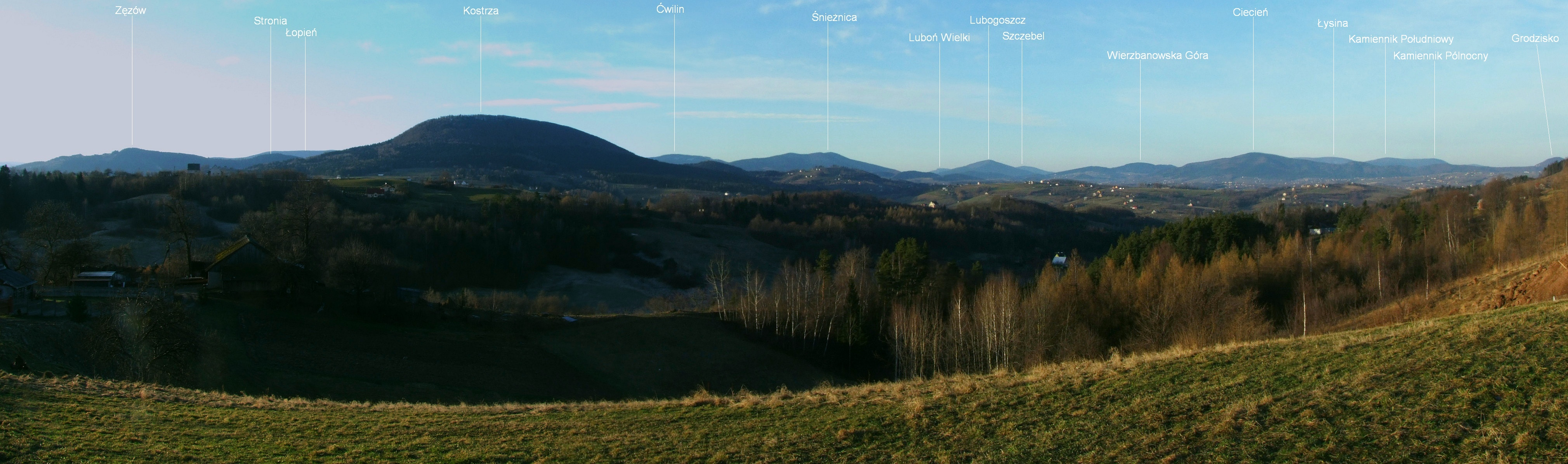 Panorama na południową i zachodnią stronę ze Starego Rybia